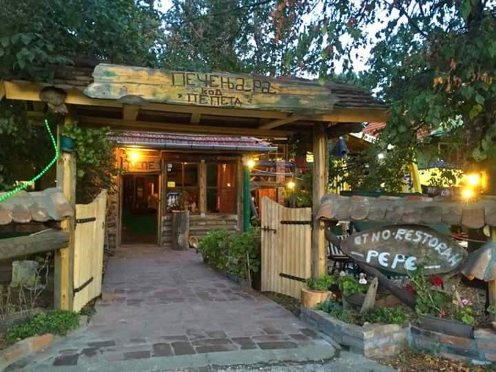 Печењара